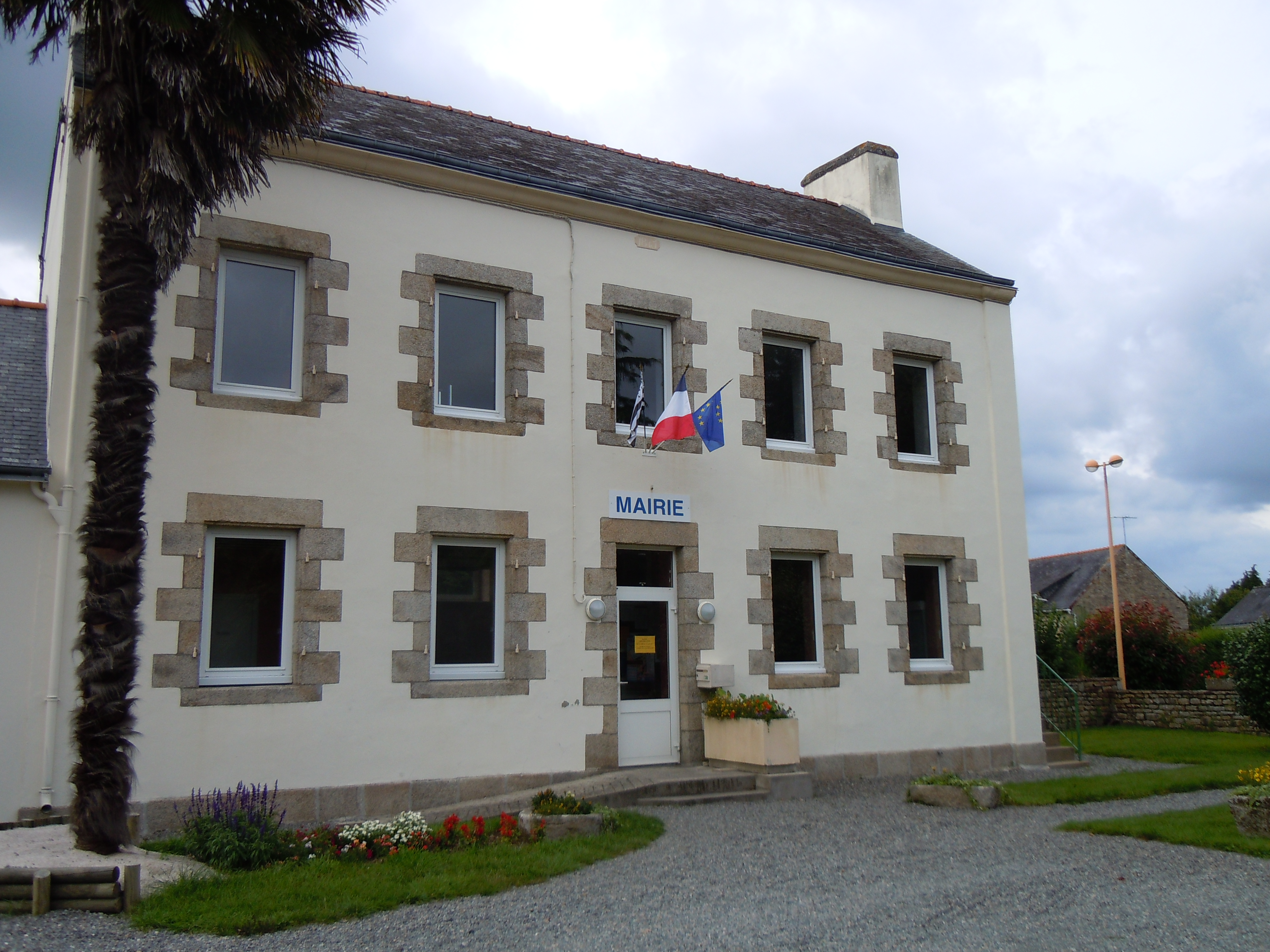 mairie de Baye ( département du Finistère )